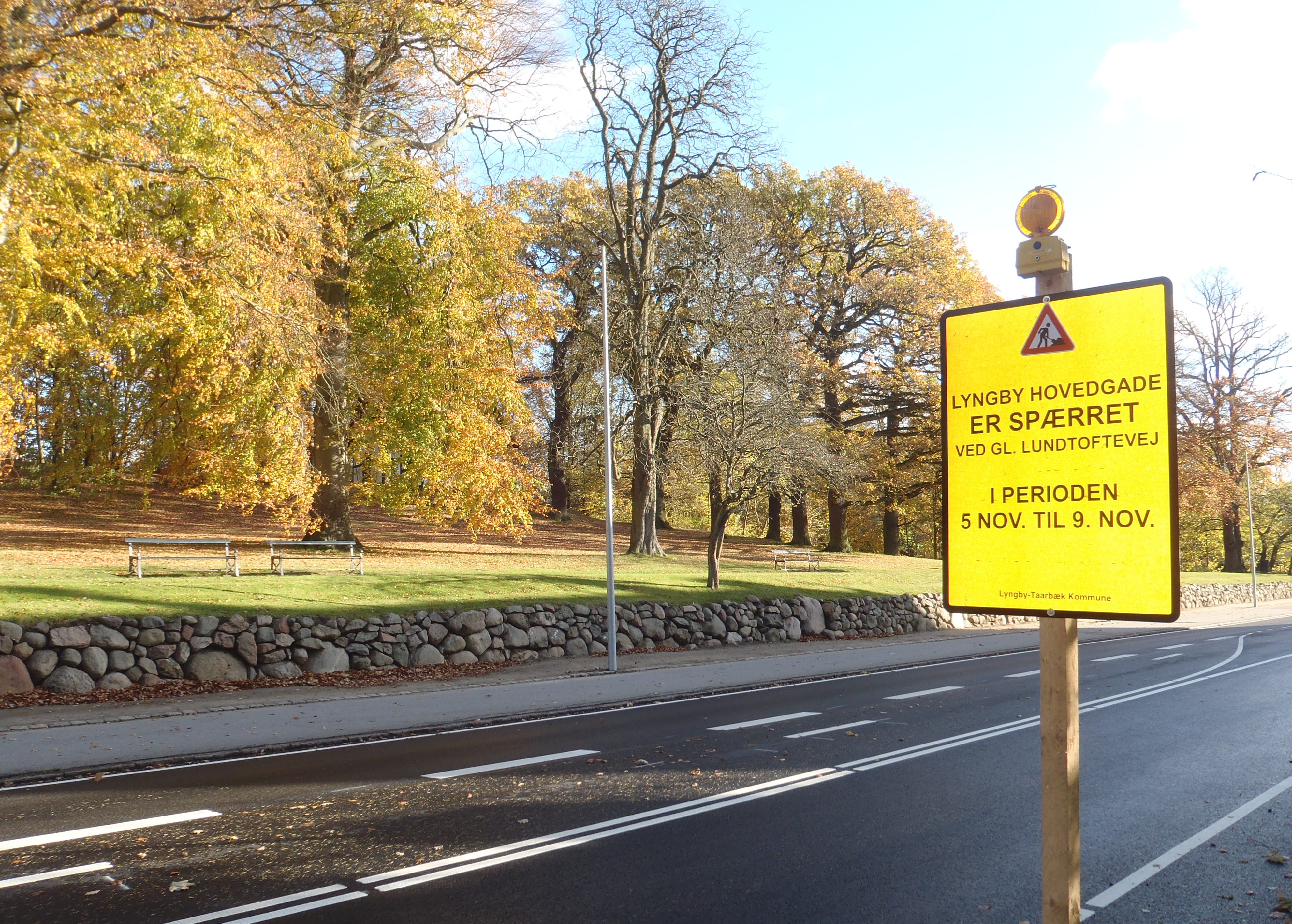 Lyngby Hovedgade og Sorgenfri Slotspark med skilt fra Lyngby-Taarbæk Kommune hvor der står at Lyngby Hovedgade er spærret ved Gl. Lundtoftevej i perioden 5 nov. til 9. nov.